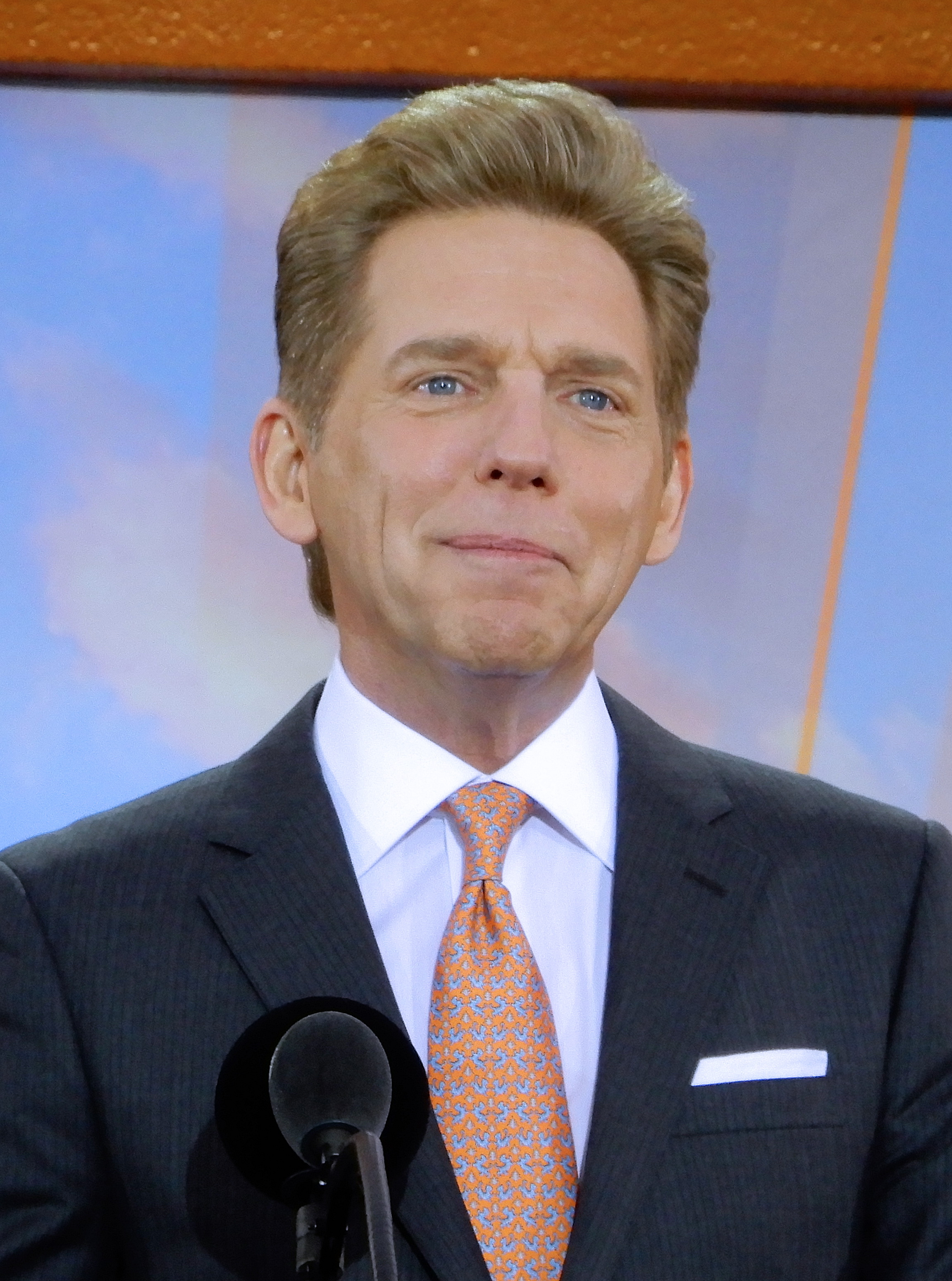 David Miscavige tijdens de opening van de nieuwe Scientology Org in Amsterdam in 2017.